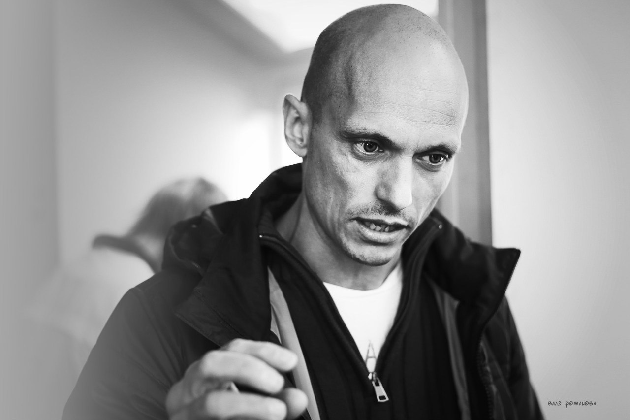 Андрей Геннадьевич Шальопа